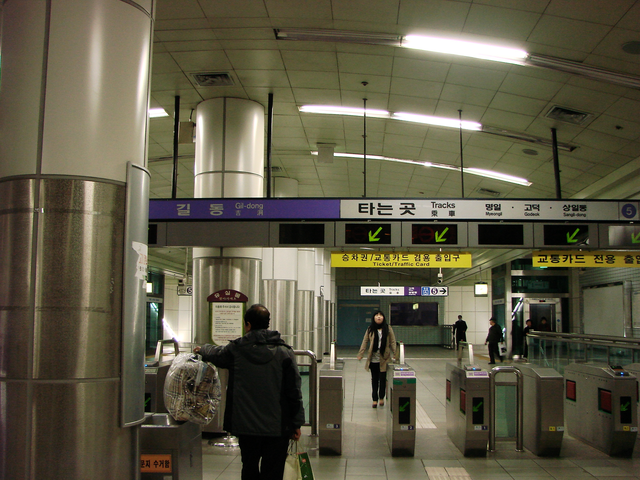 서울 지하철 5호선길동역